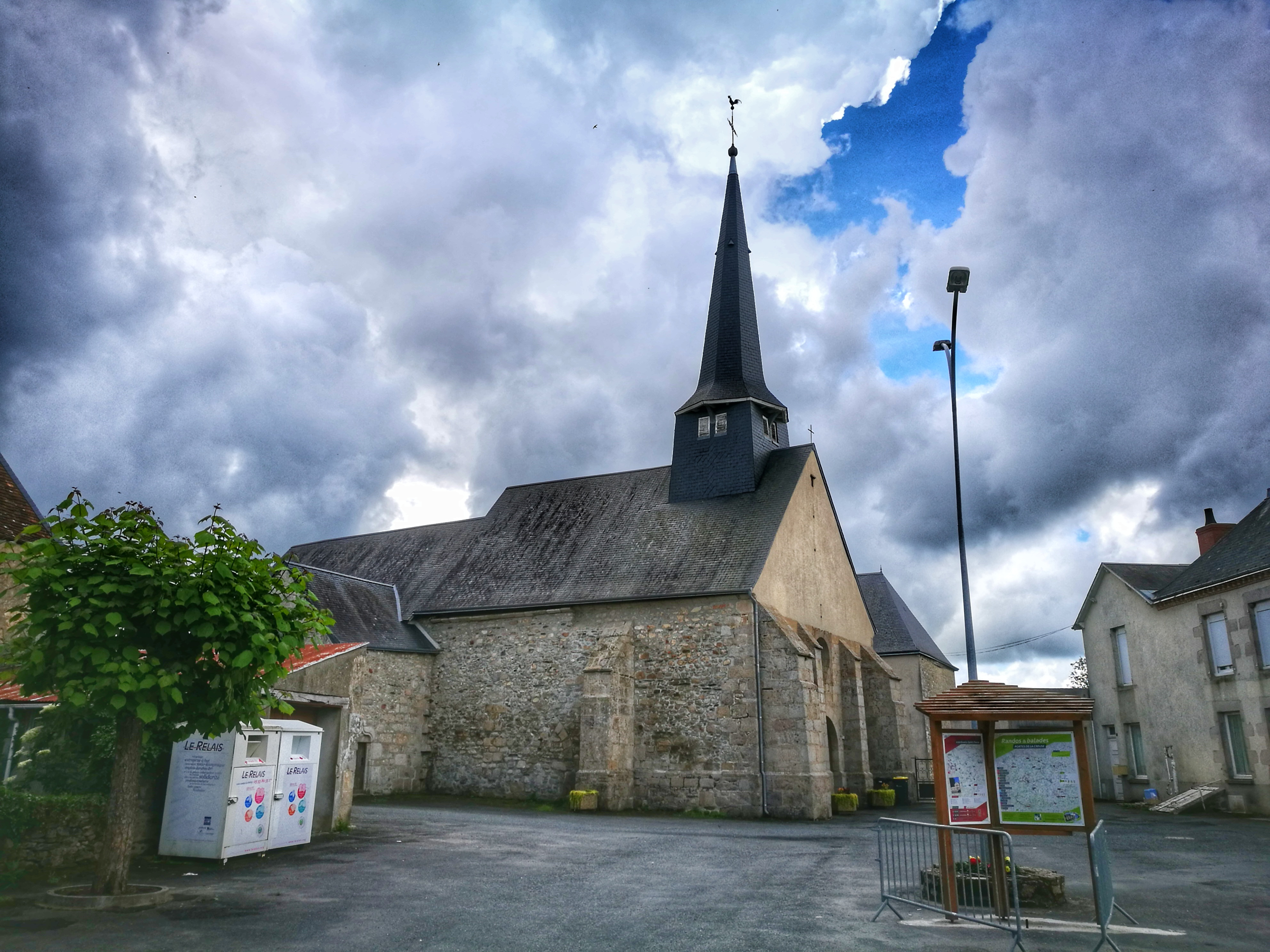 Vue latérale de l'église catholique de la commune de Lourdoueix-Saint-Pierre, Creuse, France, depuis la Place de l'Église.